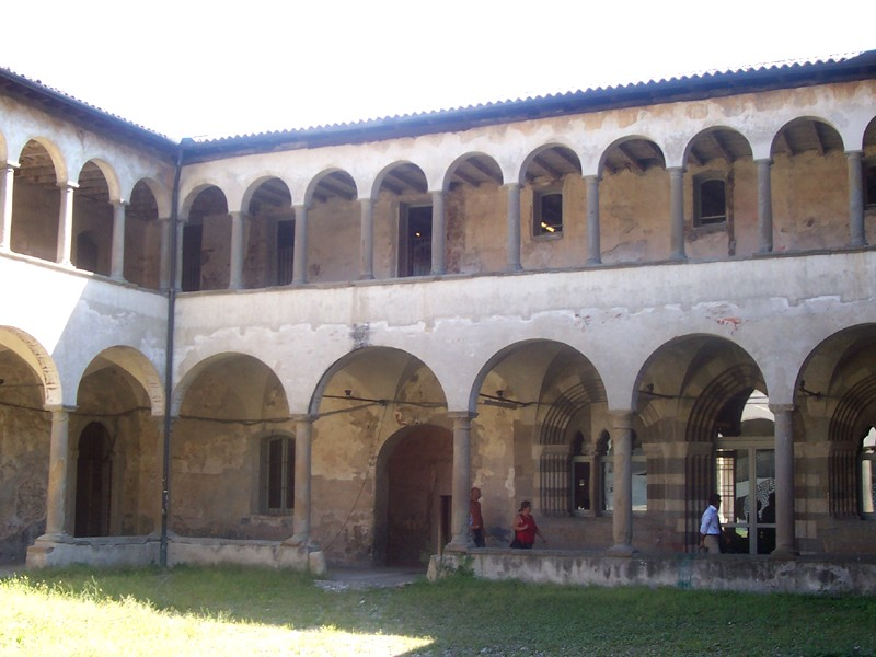 Bergamo - Chiostro della ex Chiesa di S. Agostino